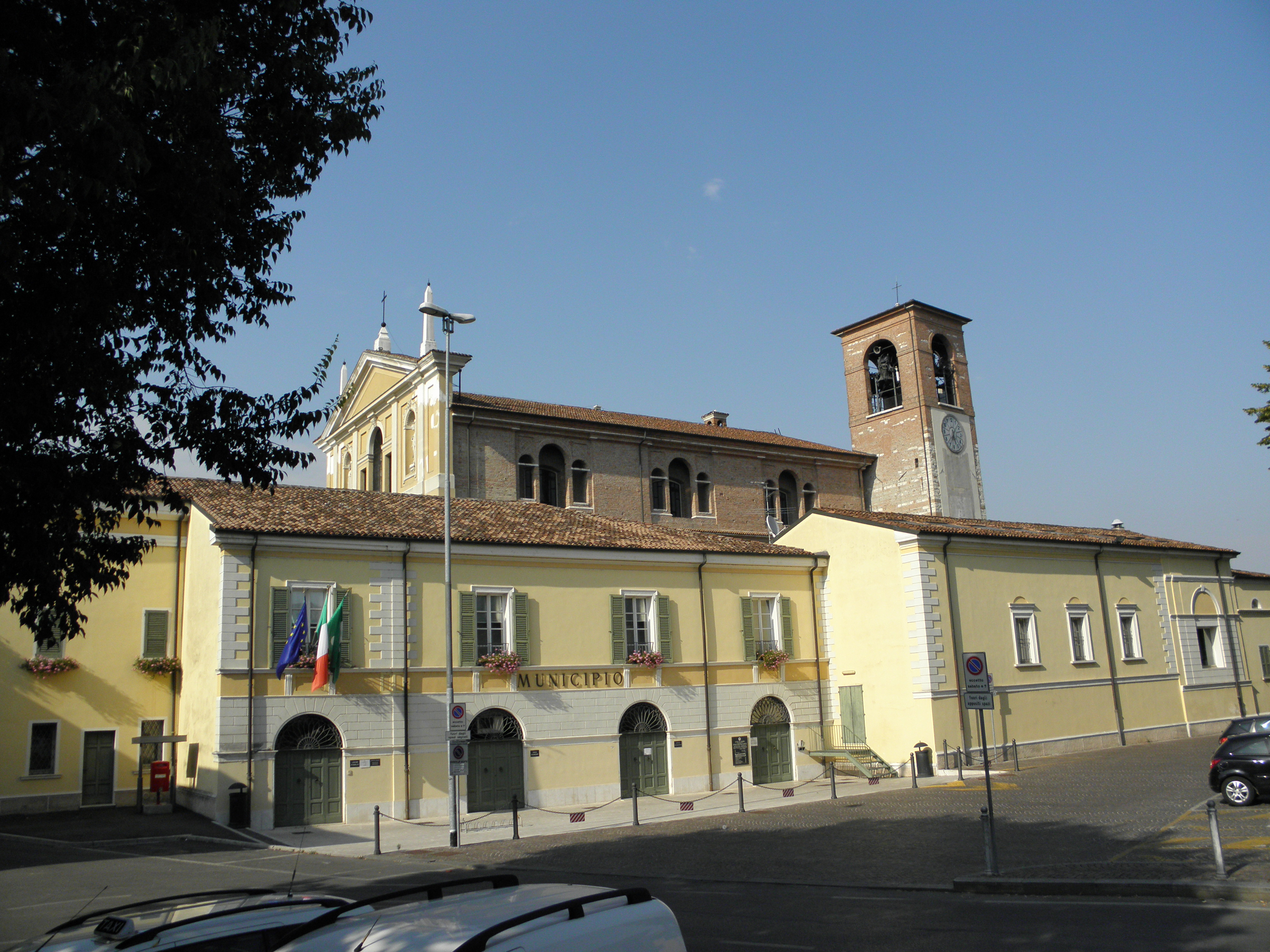 Ghedi, Palazzo Comunale: prospetto su Largo Zanardelli. In secondo piano dietro il tetto spunta la Chiesa parrocchiale di Santa Maria Assunta (XVII secolo) con il precedente campanile del XV secolo.